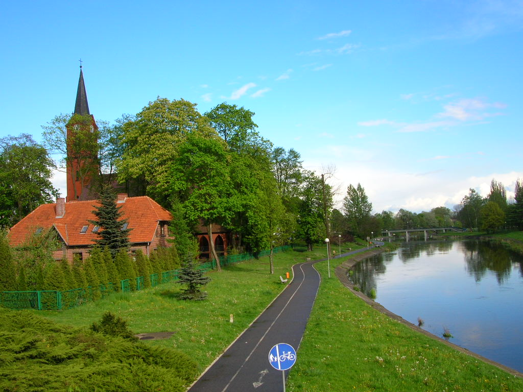 Piła - Bulwar nad Gwdą Autor - Bartek Wawraszko